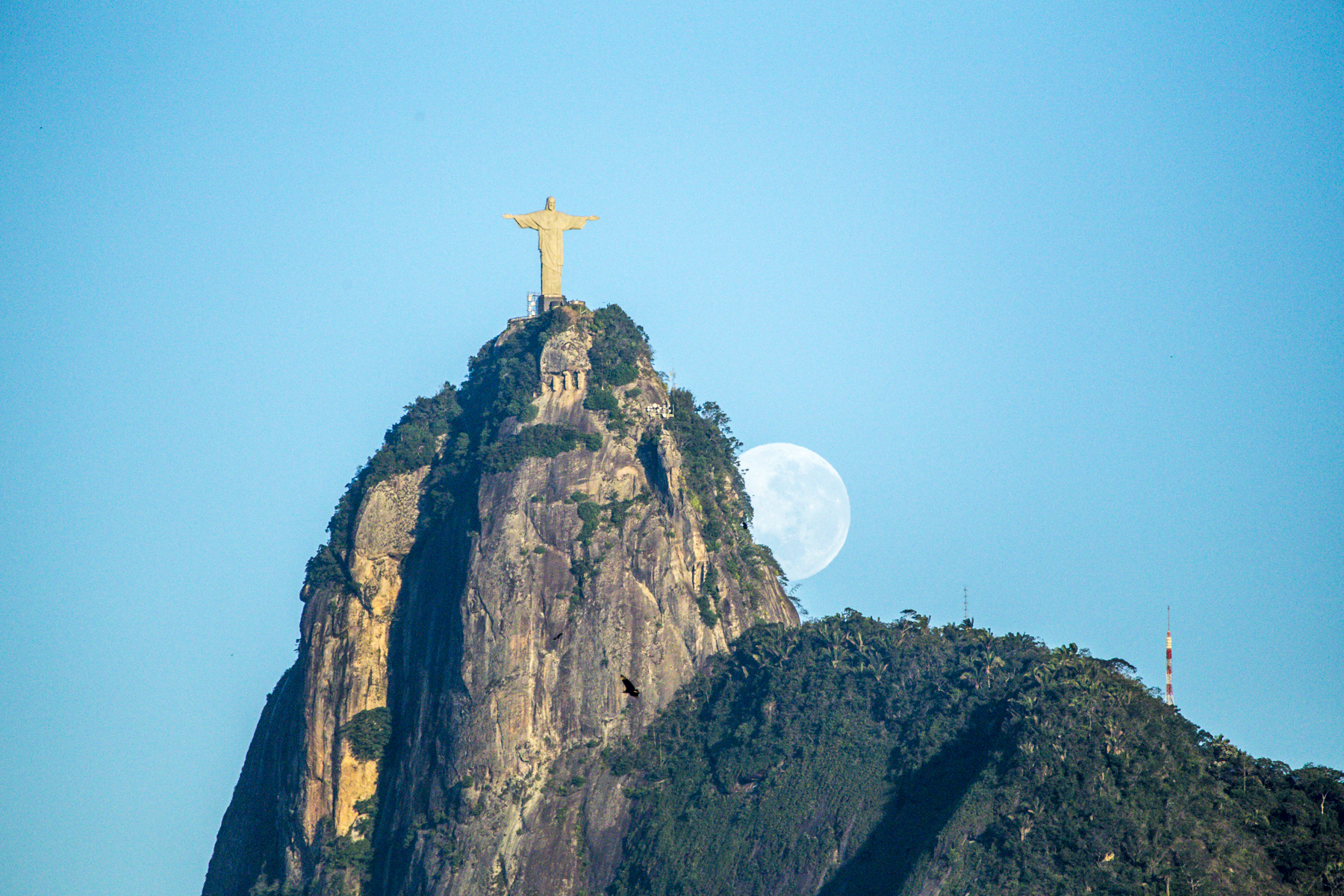 Lua cheia morrendo atrás do Corcovado